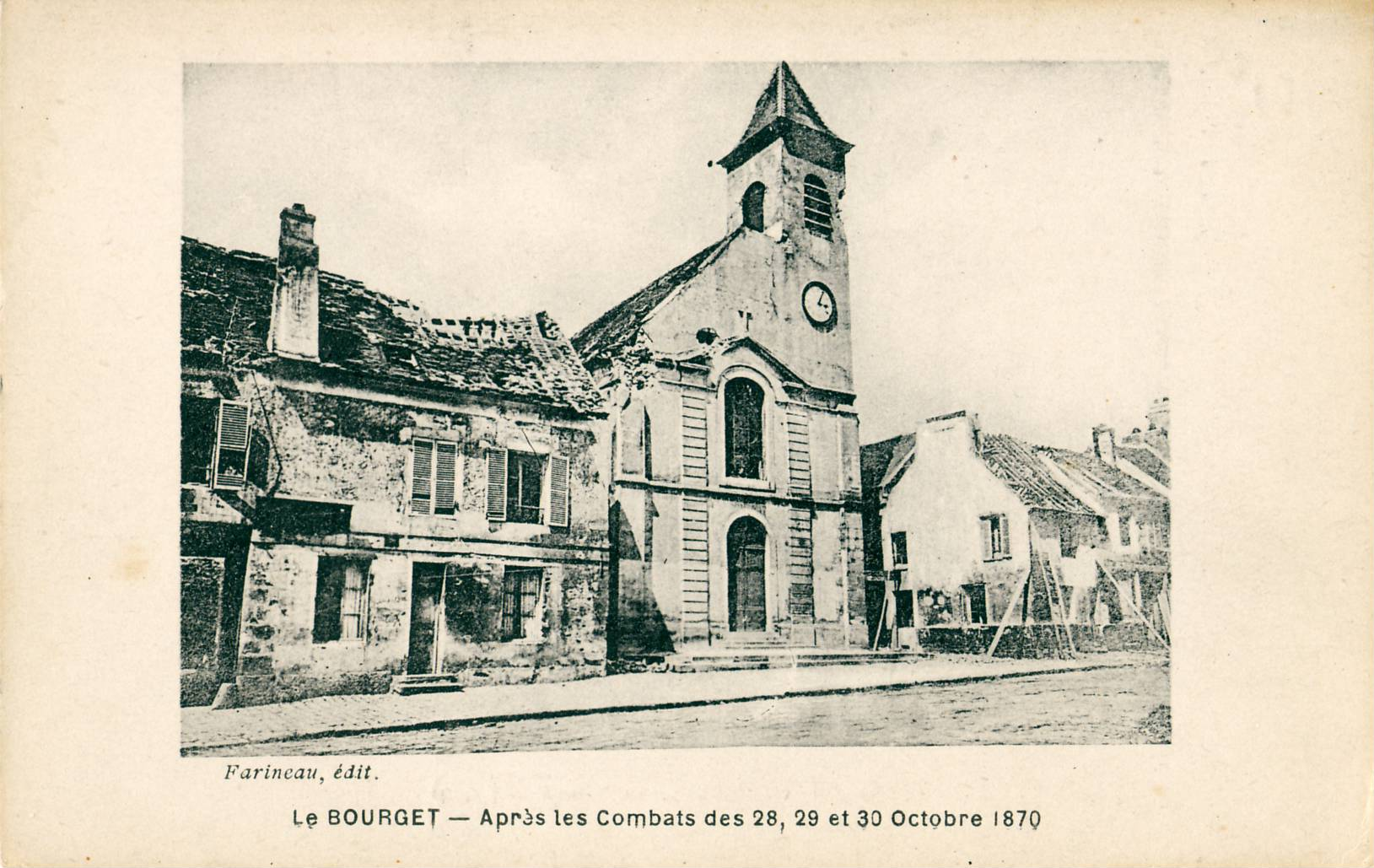 Carte postale ancienne éditée par Farineau Le Bourget, après les combats des 28, 29 et 30 octobre 1870